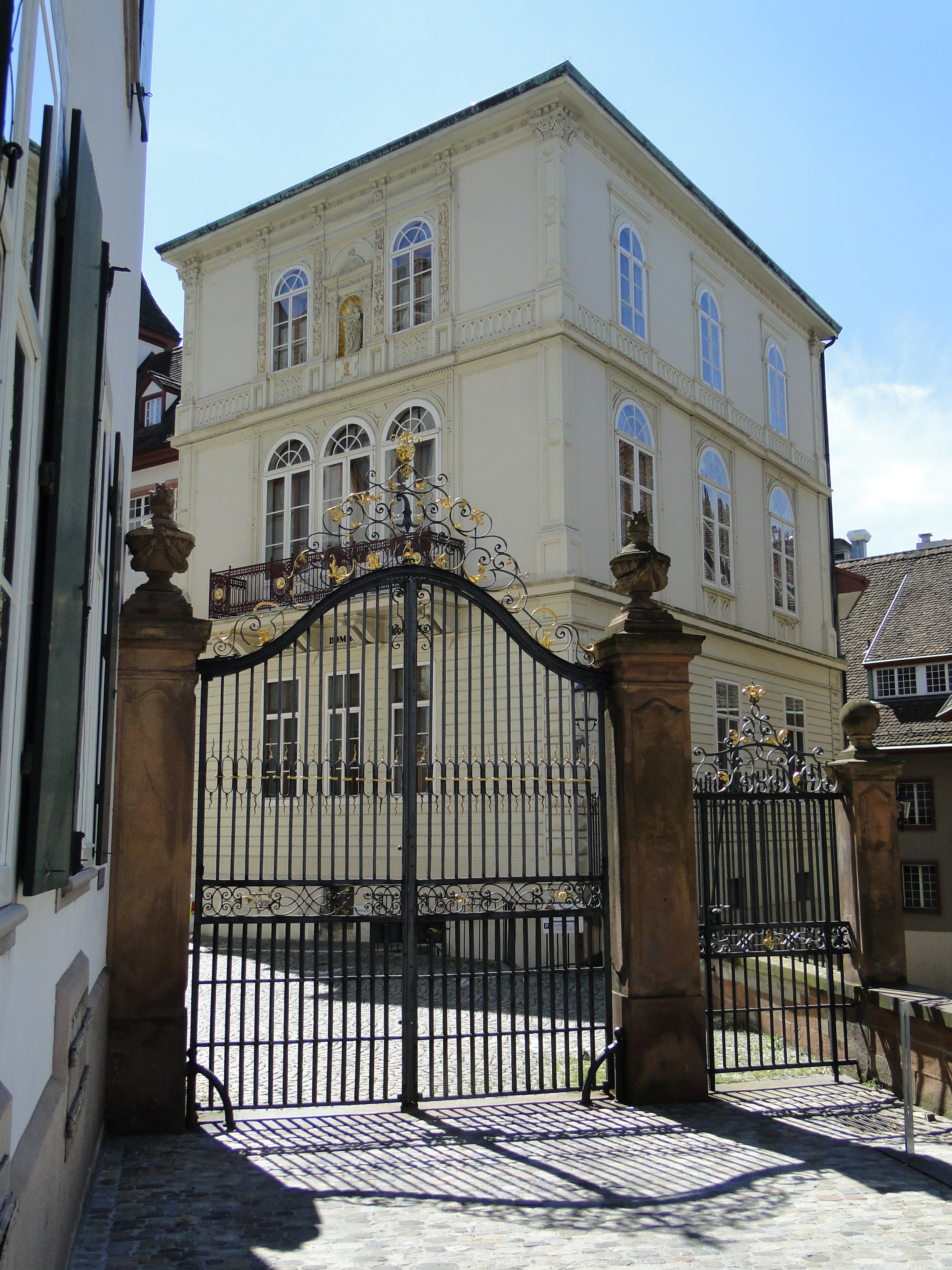 Domhof 1841, Münsterplatz 12